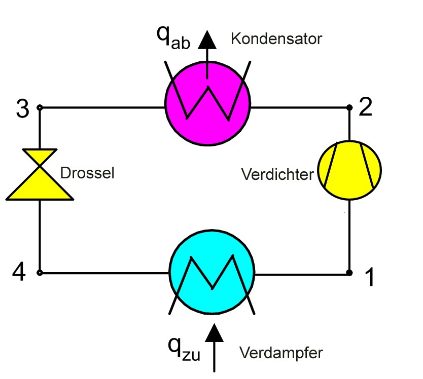 Schaltbild einer Wärmepumpe